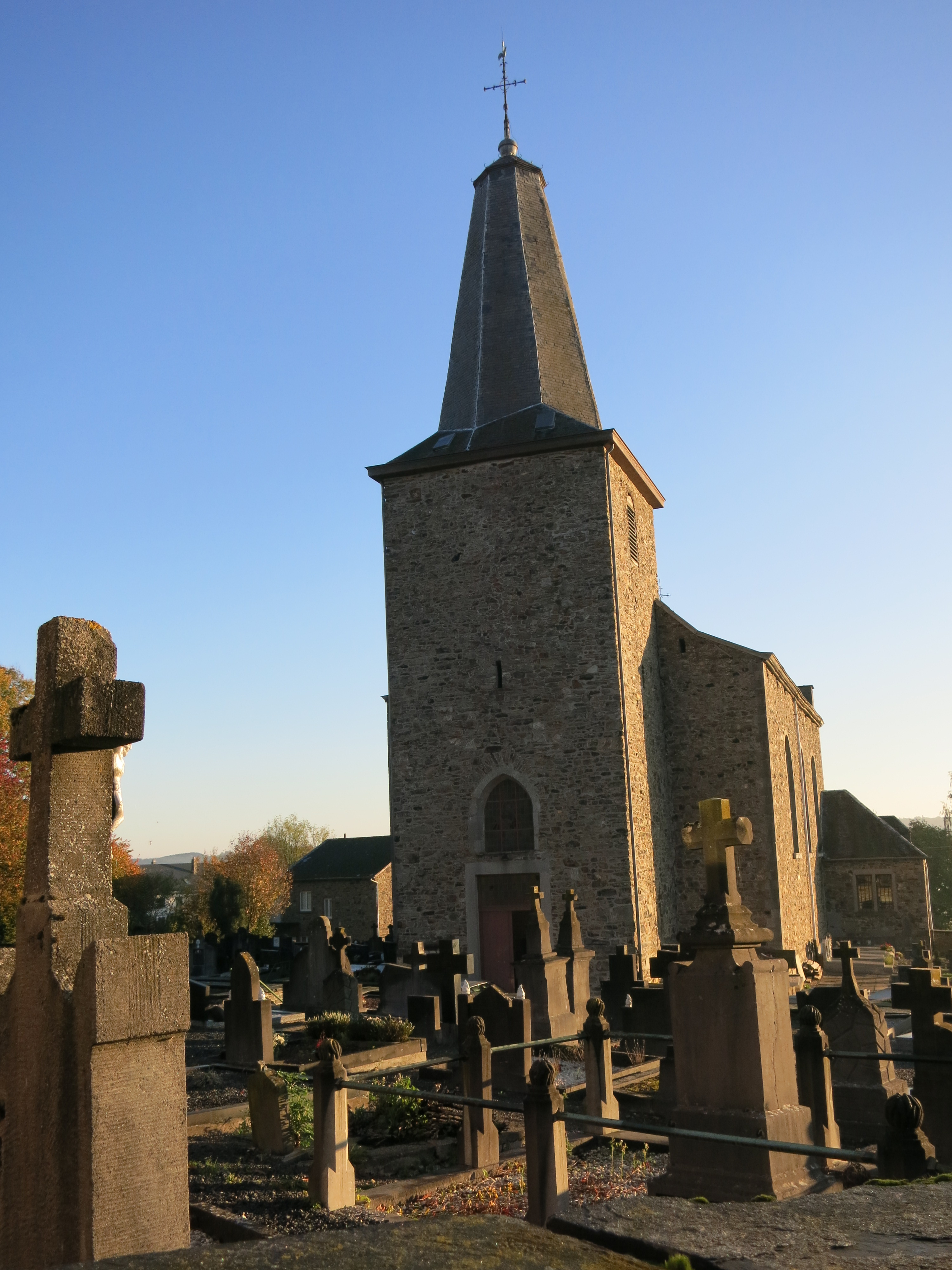 Eglise Sainte-Marie-Madeleine, Wanne (Trois-Ponts)